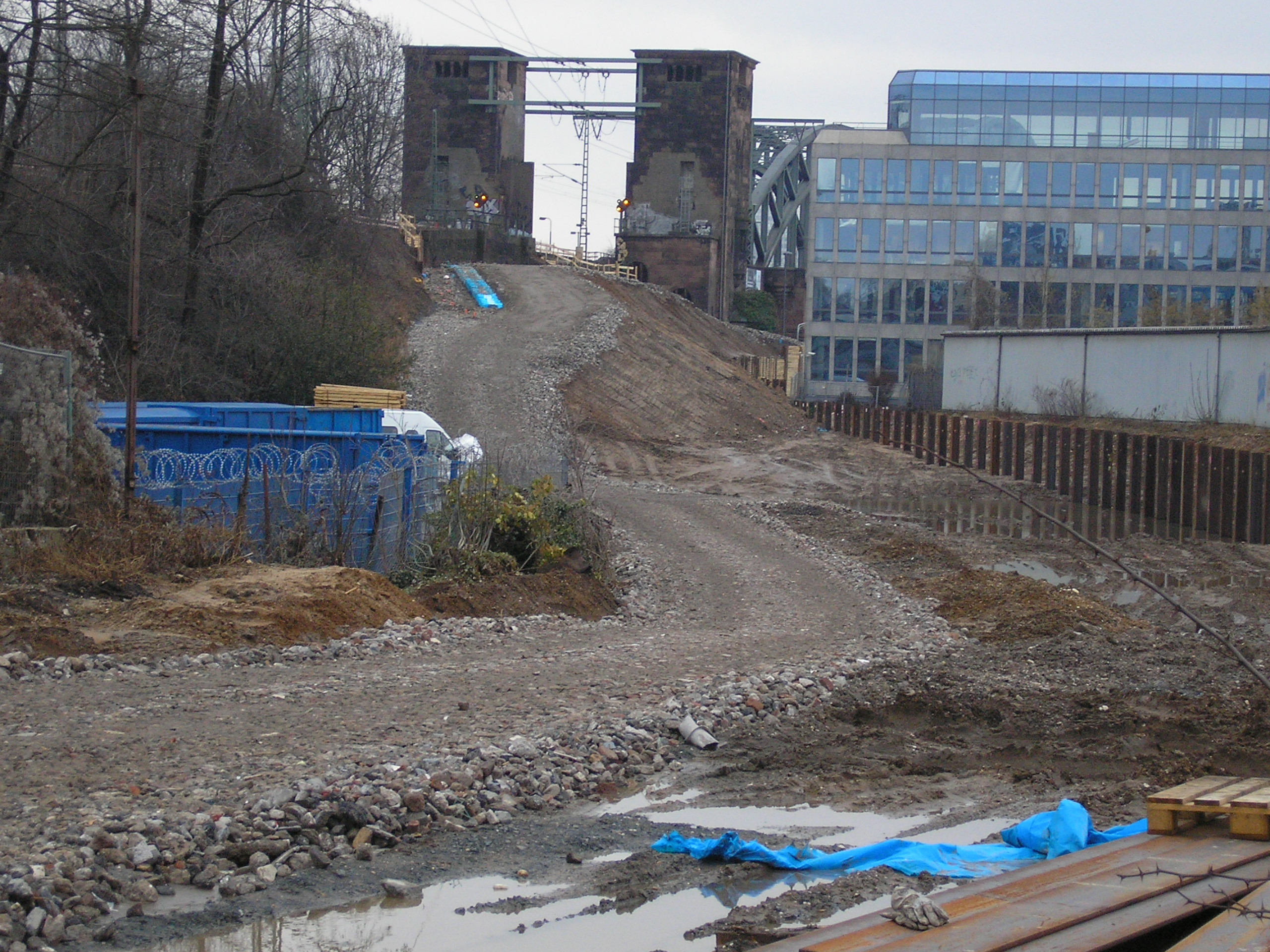 Trasse der Nord-Süd-Stadtbahn in Köln-Bayenthal, links die Portale der Südbrücke. Parallel zur Bahntrasse an der Kölner Südbrücke wird die Trasse der Nord-Süd-Stadtbahn zwischen der unterirdischen Haltestelle Marktstraße und der Haltestelle an der Schönhauser Straße gebaut.